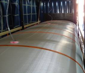 Büscherhoff-Mehrkammerflexitank